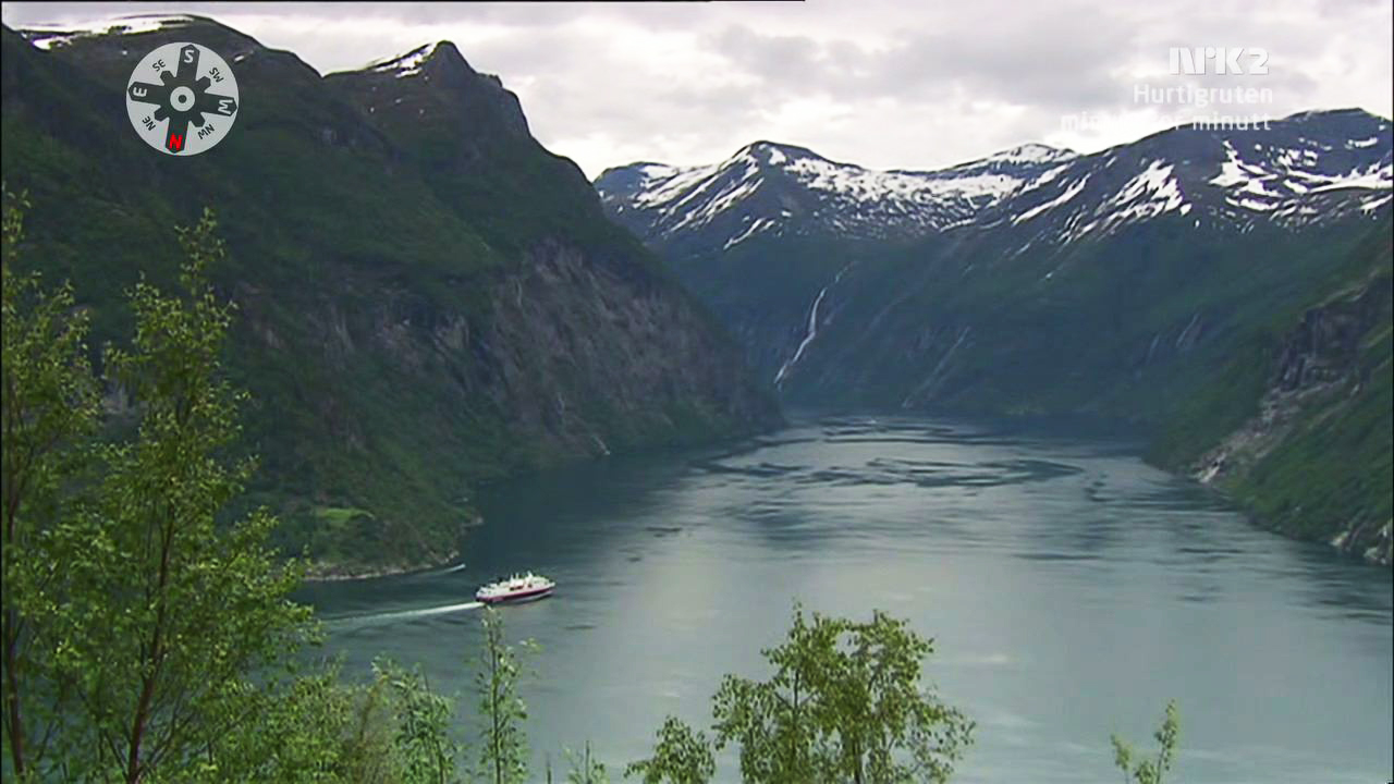 Hurtigruten på vei inn Geirangerfjorden. Bildet er grabbet fra videofeed.